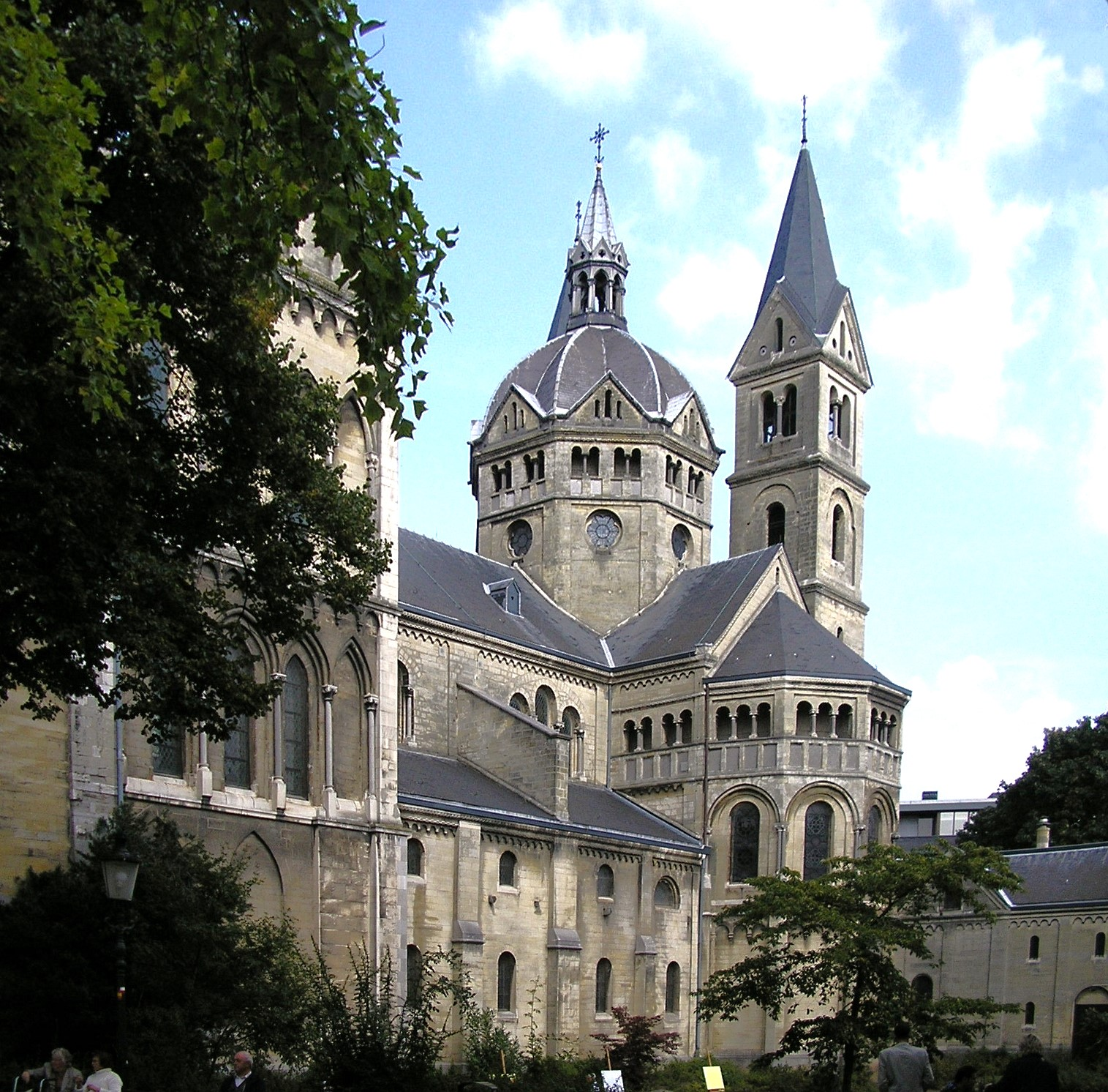 Münsterkirche Roermond